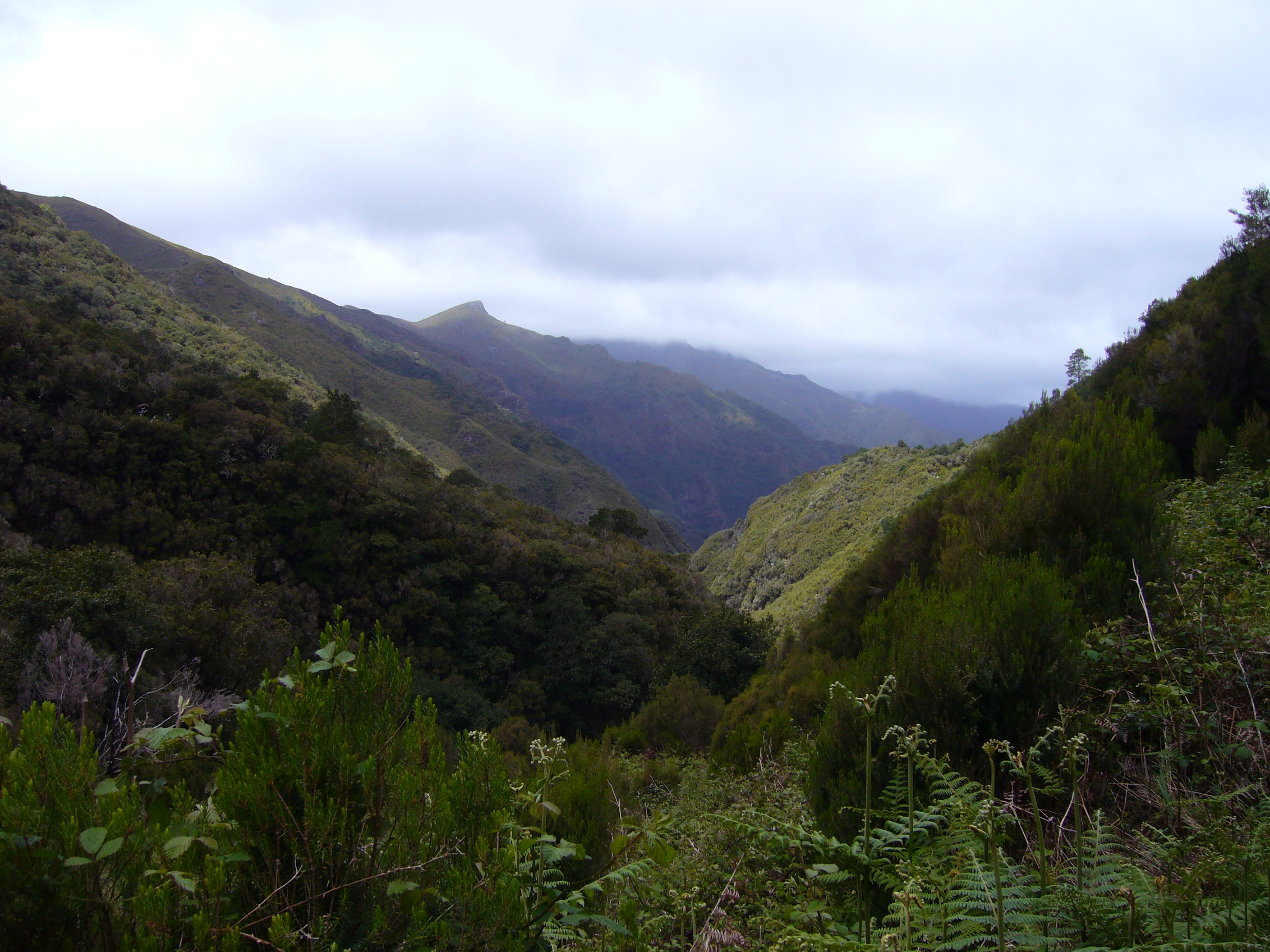 Údolí říčky Ribeira da Janela pod Rabaçalem.